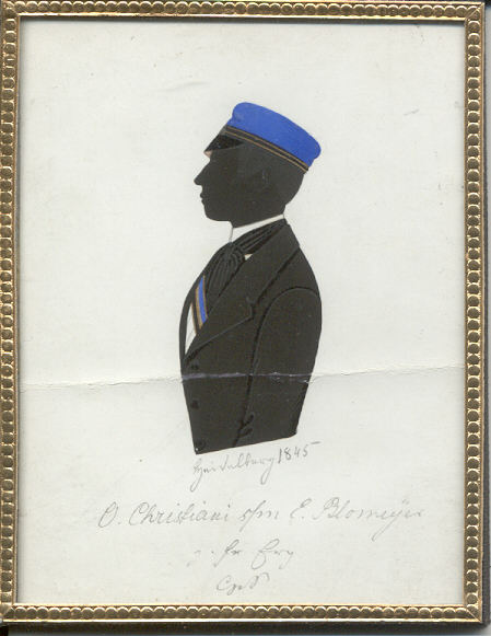 Silhouette von O. Christiani († 1855), Angehöriger der Corpslandsmannschaft Normannia Königsberg